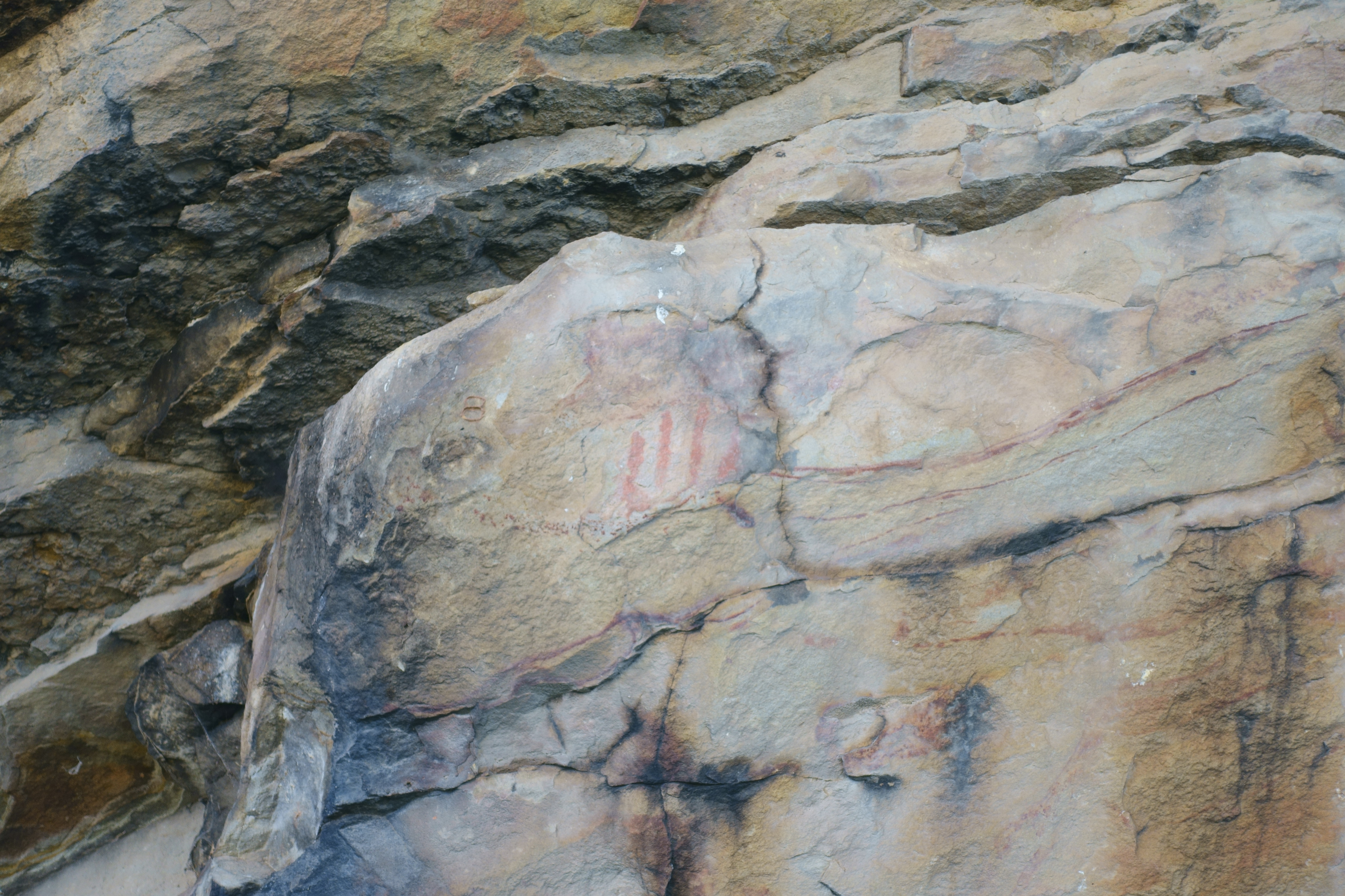 Estación rupestre de Covachón del Puntal, en el monte Valonsadero (Soria, España).